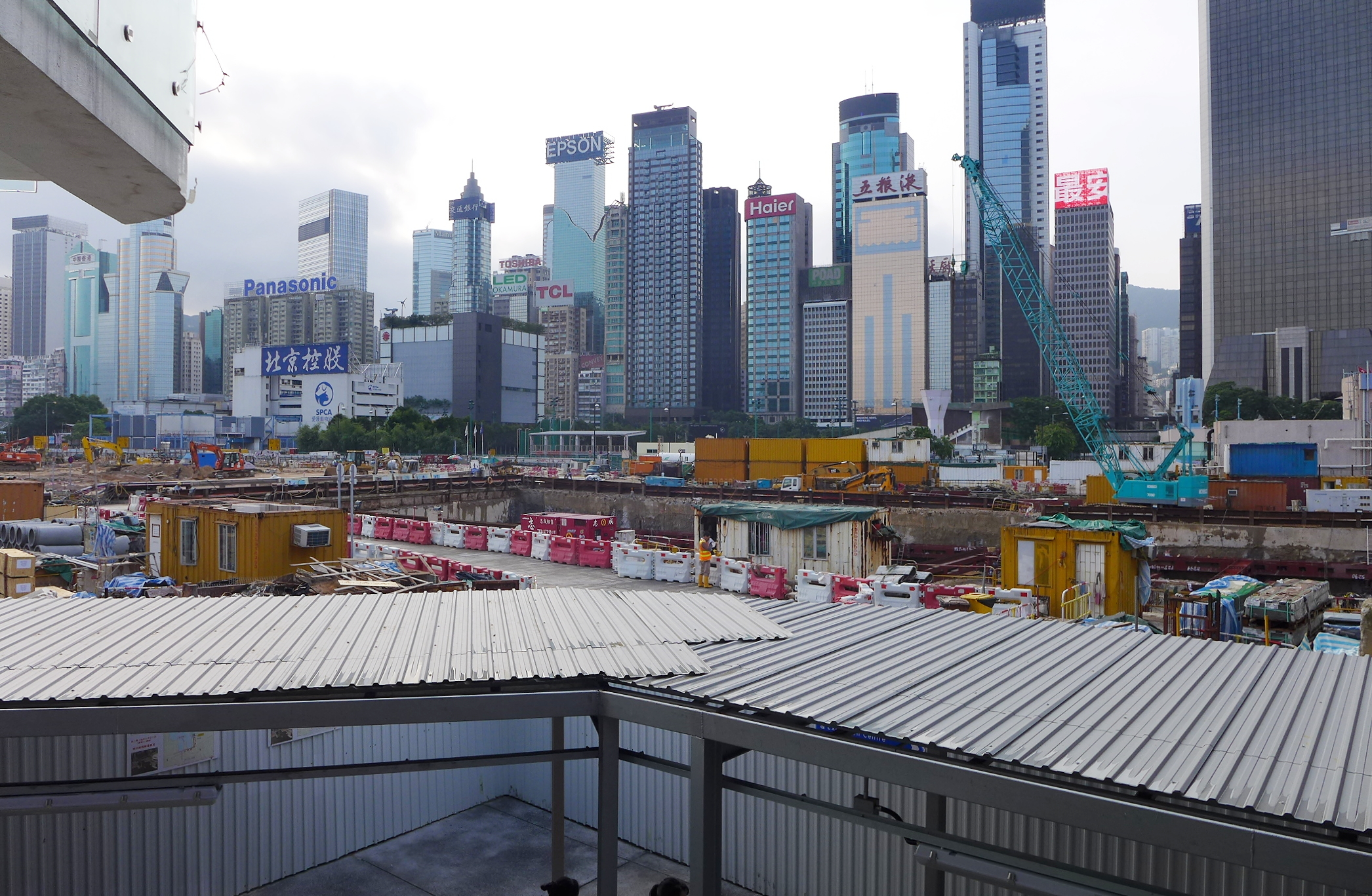 Wan Chai Reclamation